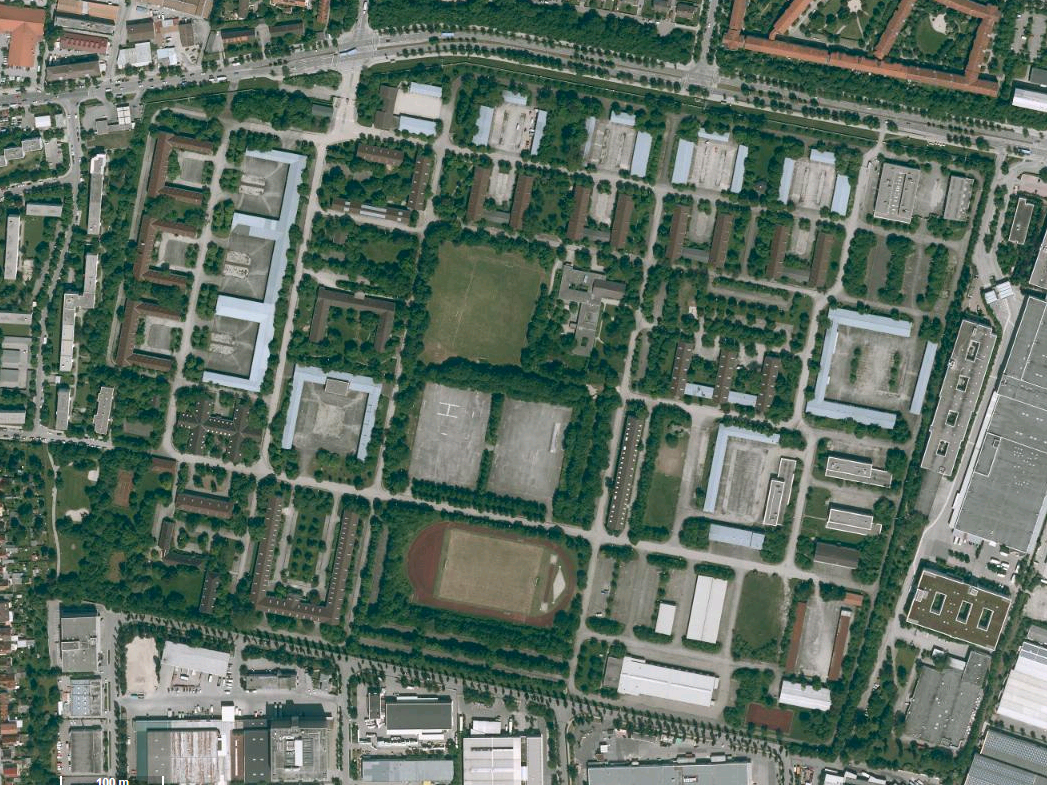 Luftaufnahme der Bayerischen Vermessungsverwaltung der Bayernkaserne in München, Bayern (Befliegungsdatum: 26.05.2012. Bildflug-Nr.: 112013)